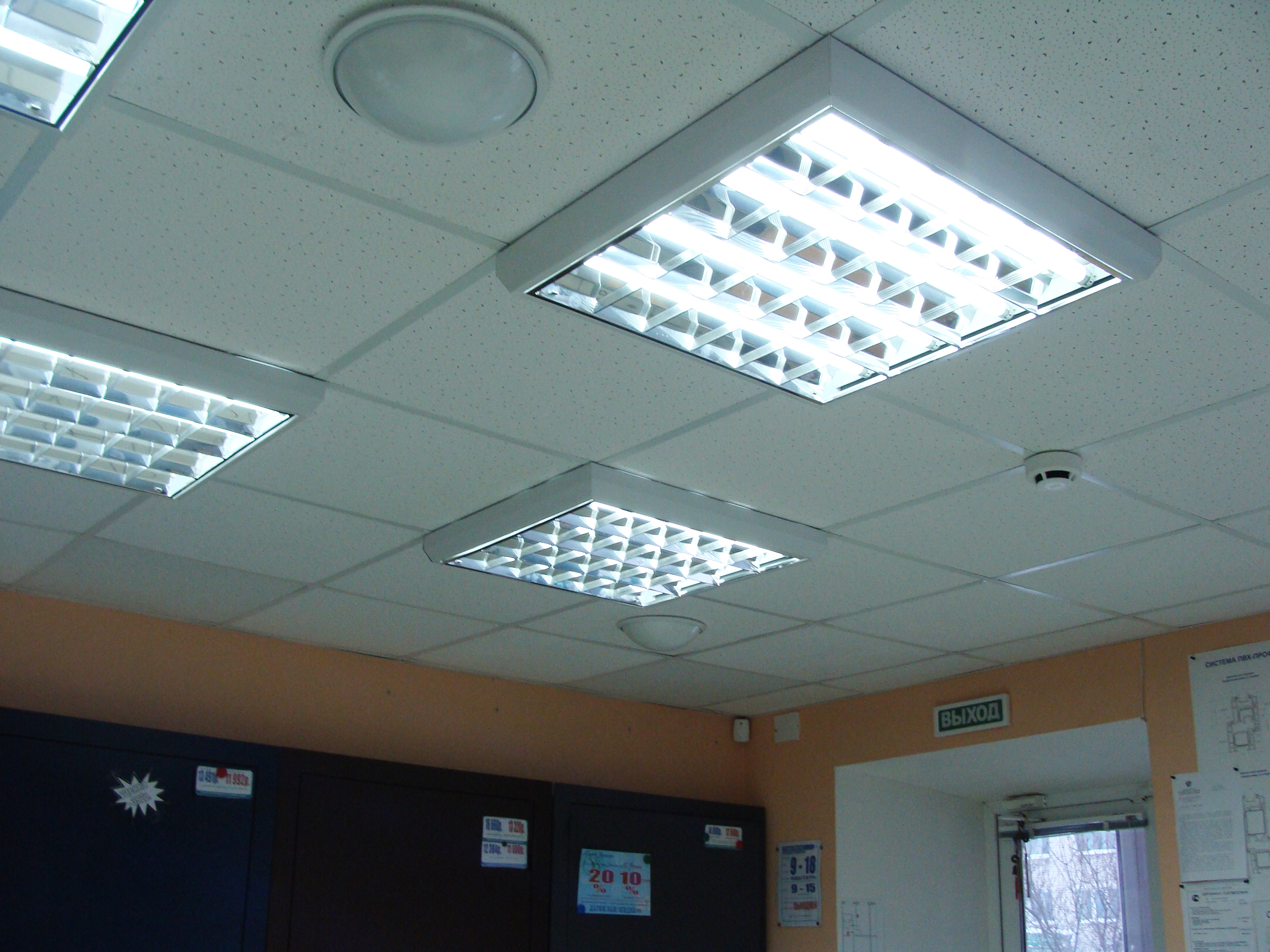 Порошковое пожаротушение в магазине. Котлас.